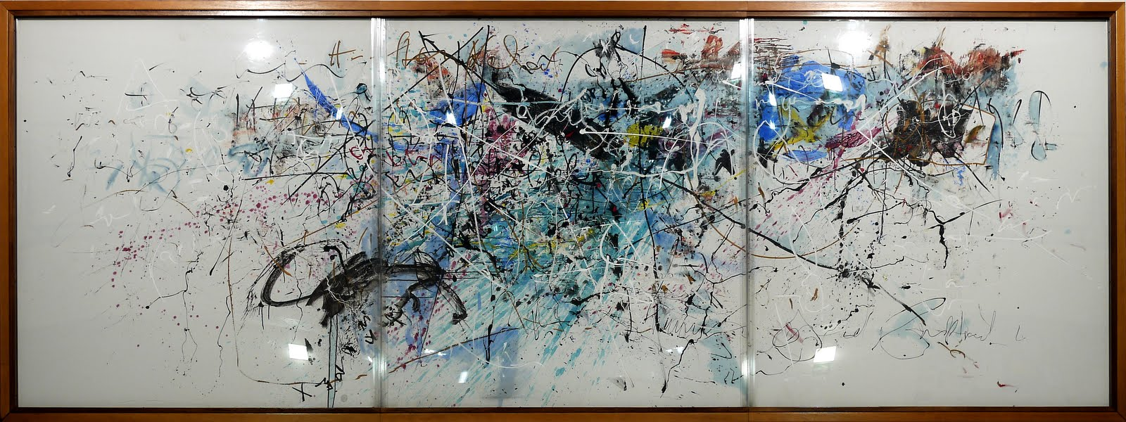 Alterlaa Kunst am Bau Hans Staudacher